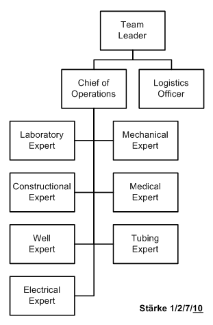 Aufstellung des SeeWa Teams des THW